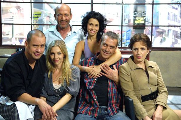 ליאת אזר בסדרה המקום